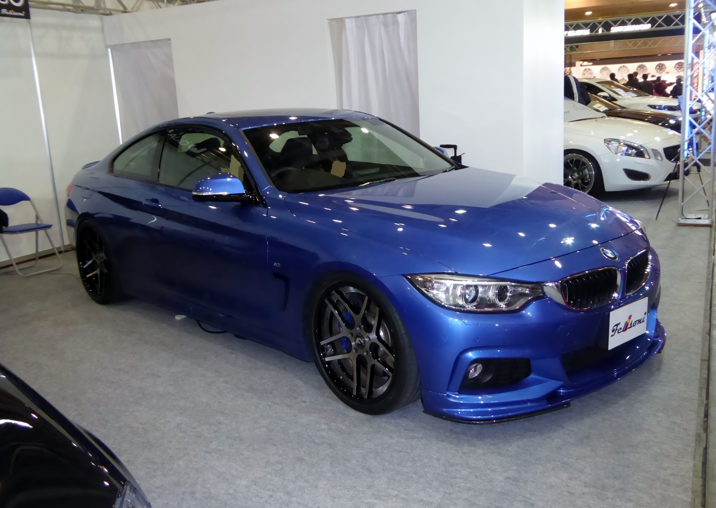 大阪オートメッセ2015においてFelisoniのオーディオ搭載のF32型BMW・435i Mスポーツを撮影。